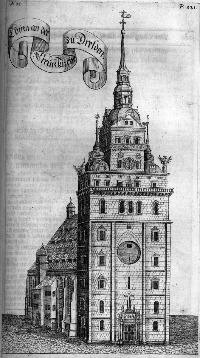 Kreuzkirche, in: Anton Weck: Der Chur-Fürstlichen Sächsischen weitberuffenen Residentz- und Haupt-Vestung Dresden Beschreib[ung] und Vorstellung, Nürnberg, Froberger für Johann Hoffmann, 1680